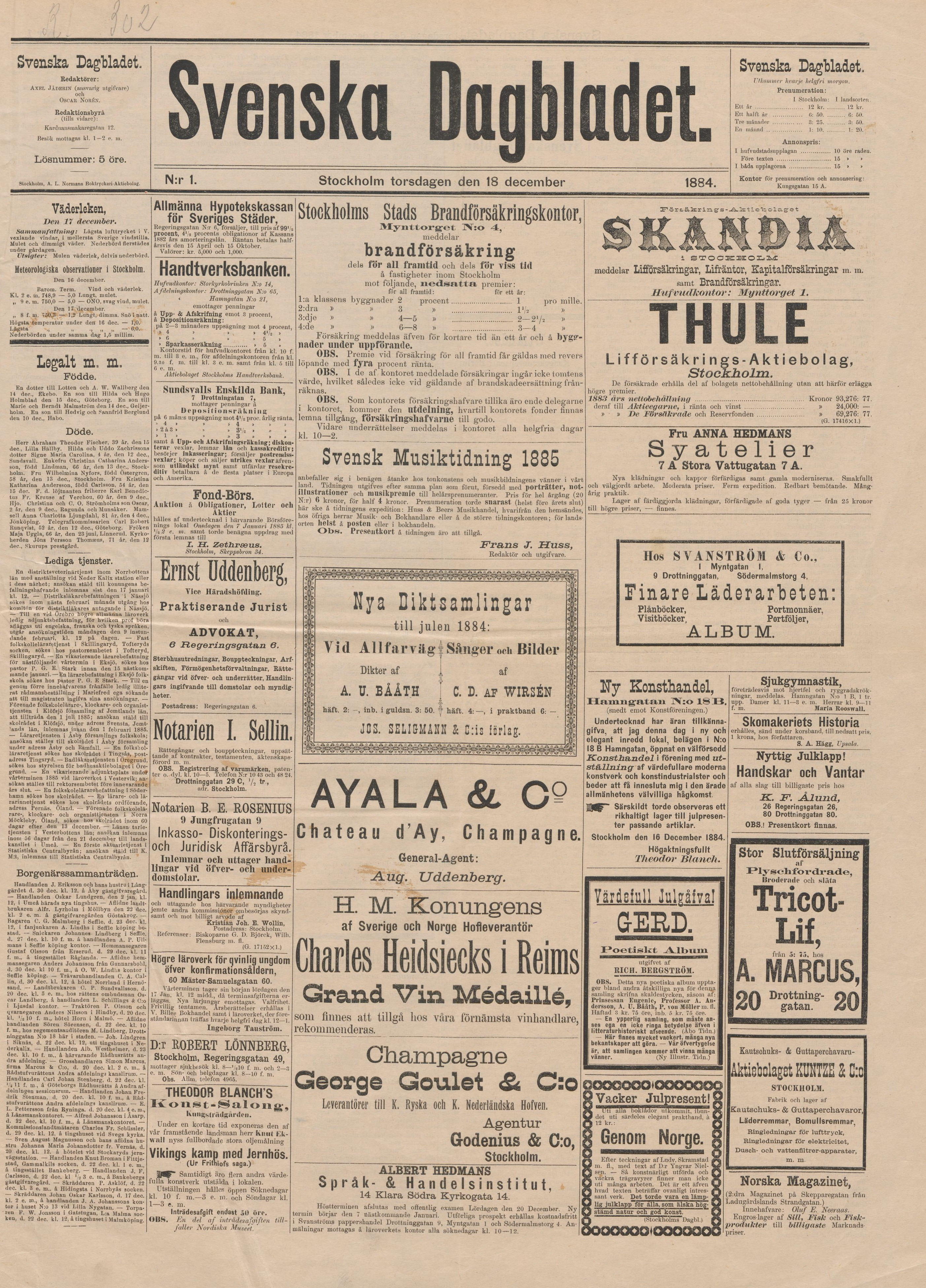 Svenska Dagbladet, 18 december 1884. Tidningens första nummer.